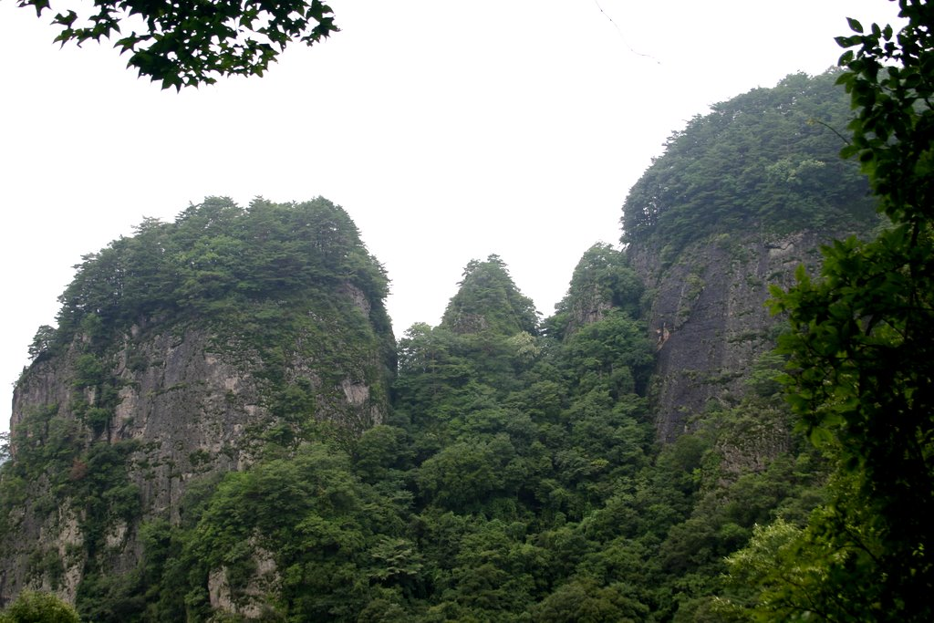 Cheongnyangsa Temple, Bonghwa County, Gyeongsangbuk-do, South Korea.